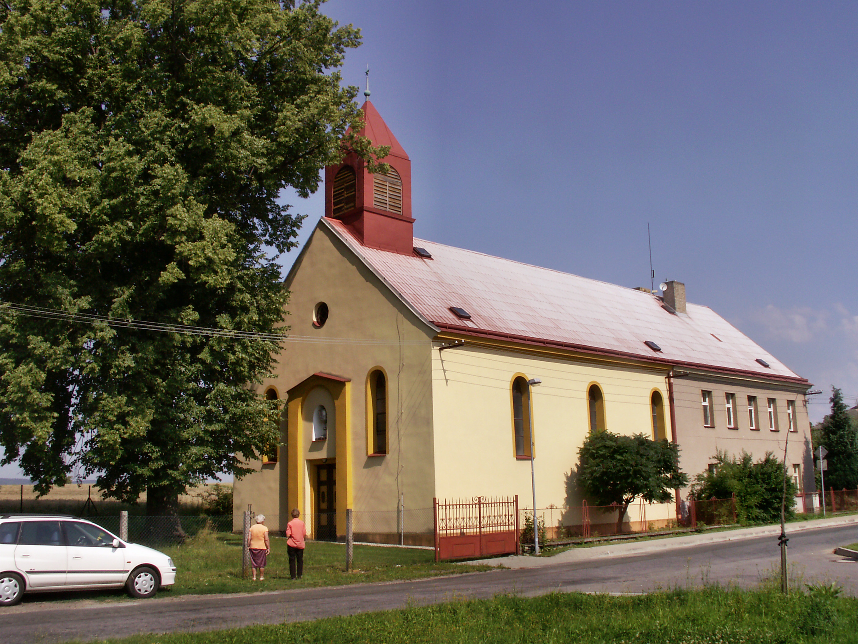 Vilémov, okres Havlíčkův Brod, evangelický kostel